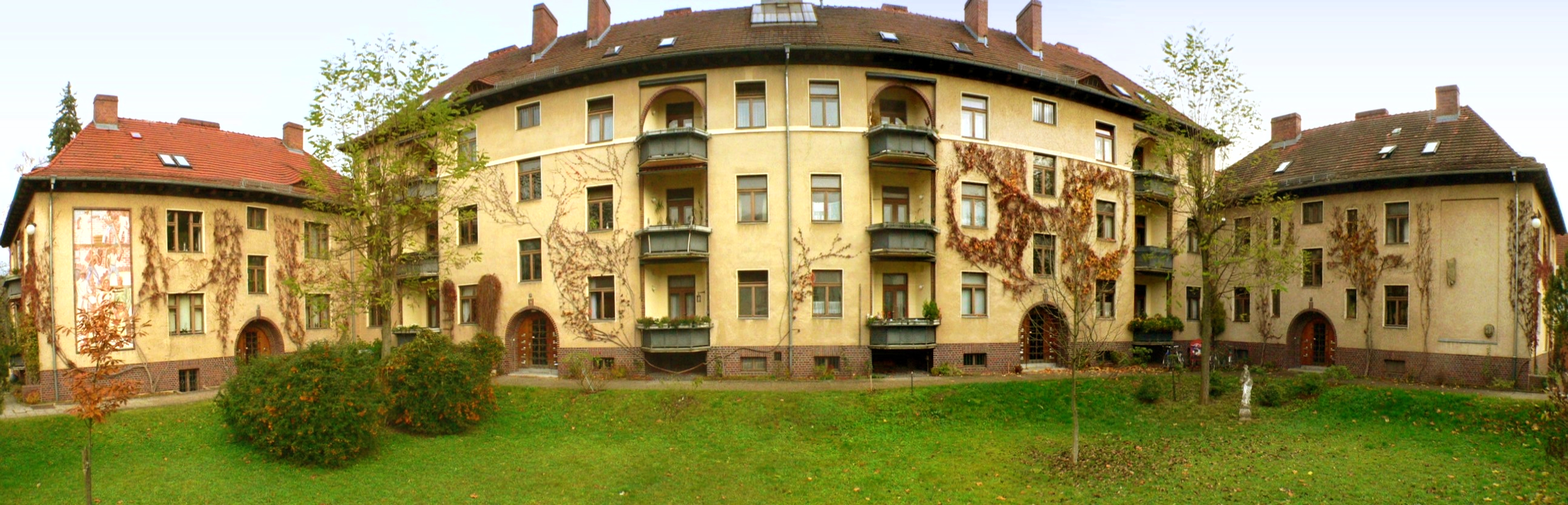 Coburg (Bayern), Scharnhorststraße 2-8, Objekt unter Denkmalschutz